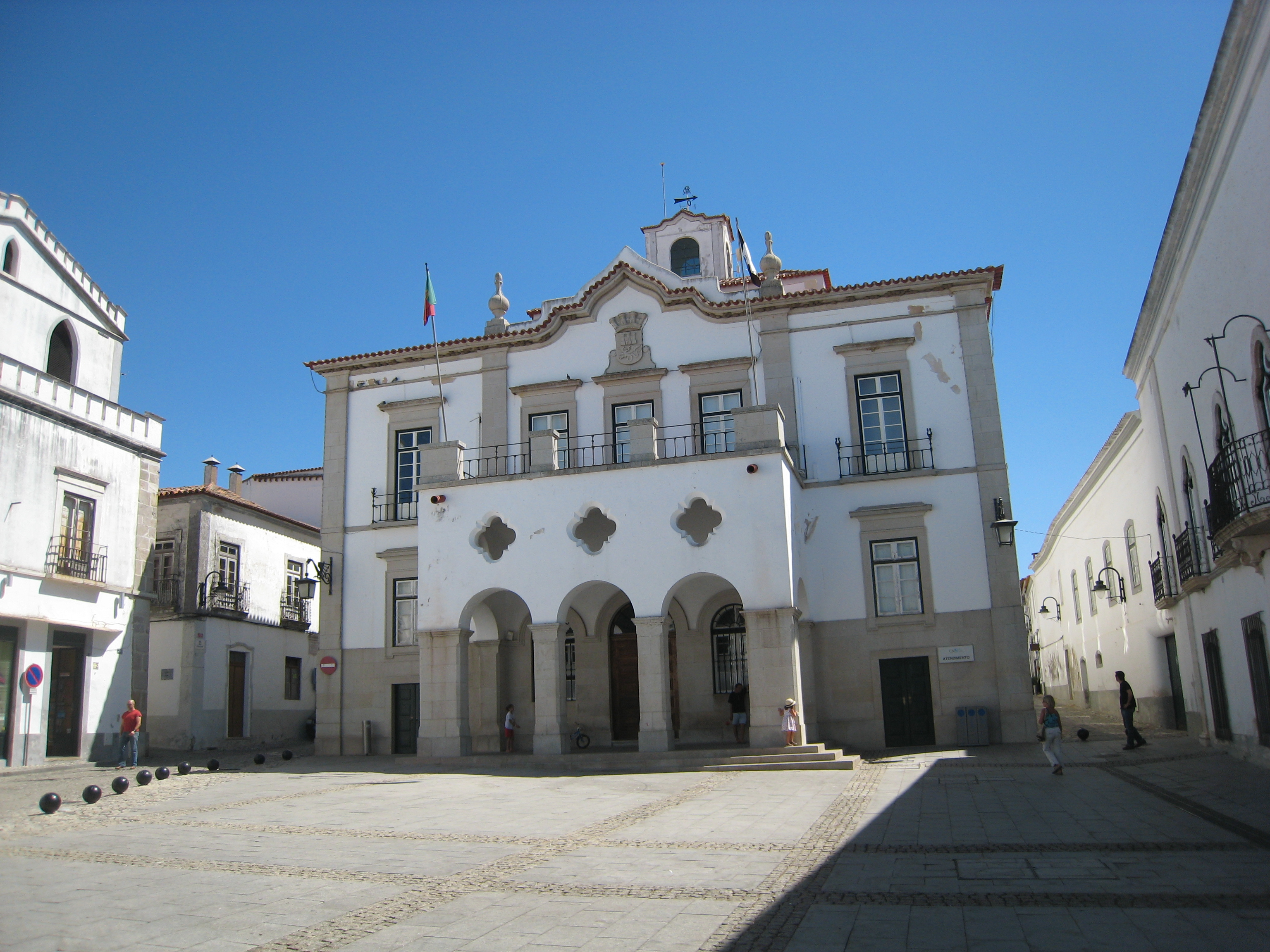 Serpa, Alentejo, Portugal.